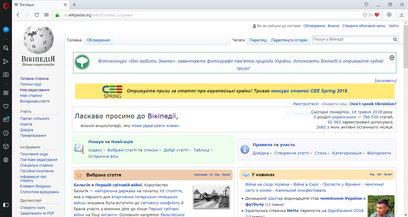 Скріншот браузера Opera 53